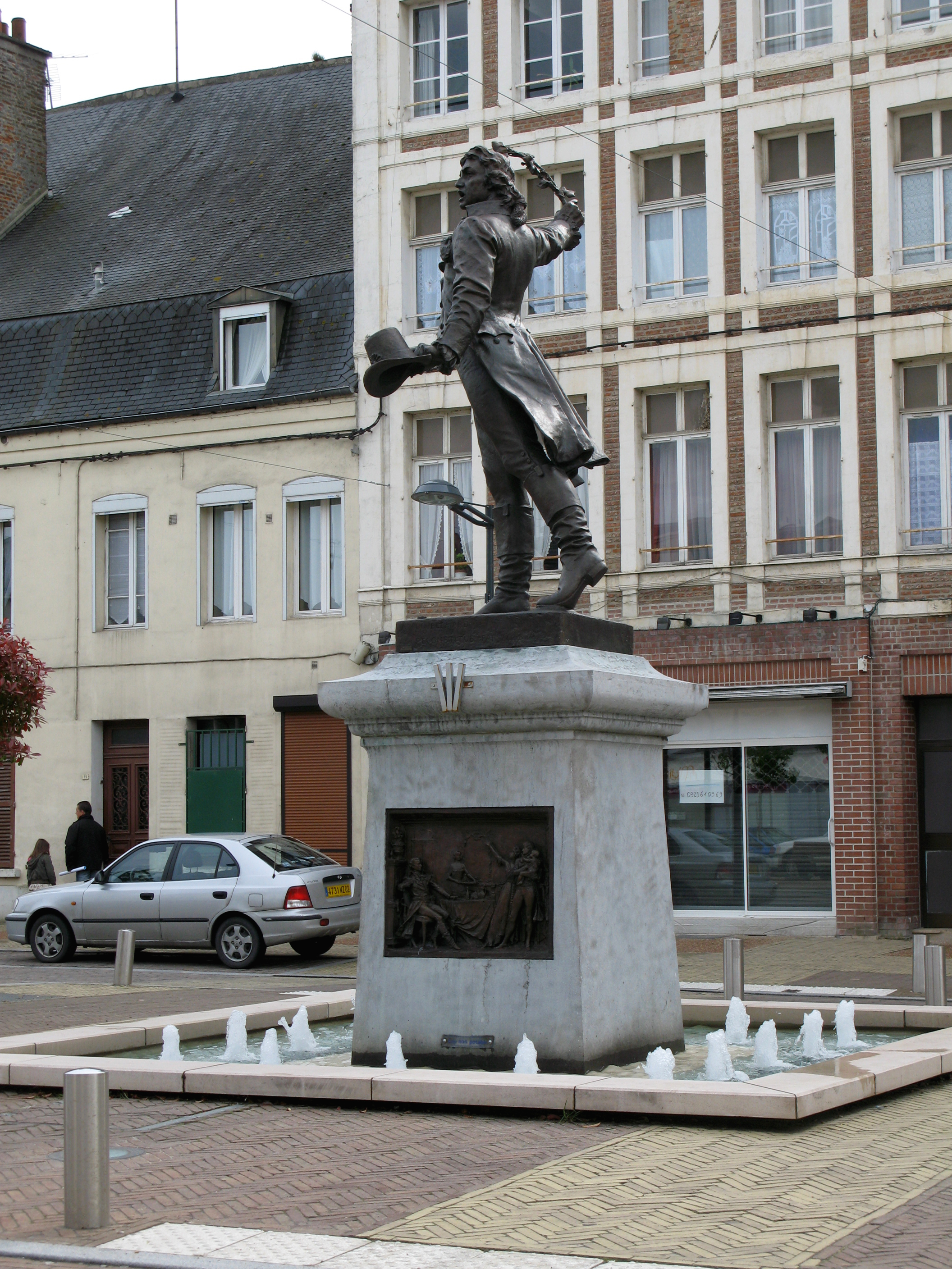 Monument à Camille Desmoulins (1890) par Amédée Doublemard, Guise (France) Inauguré le 19 octobre 1890, fondue par les Allemands pendant la guerre 1914-1918, reconstitué à l’identique en 1923, le bronze a été nettoyé en 2006, à l'occasion la rénovation de la place d'Armes la même année. .